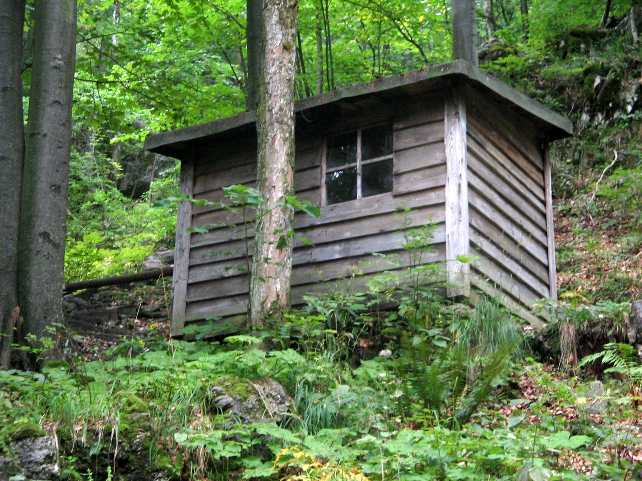 Partizanska tiskarna Slovenuja, Vojsko, Idrija, Slovenia